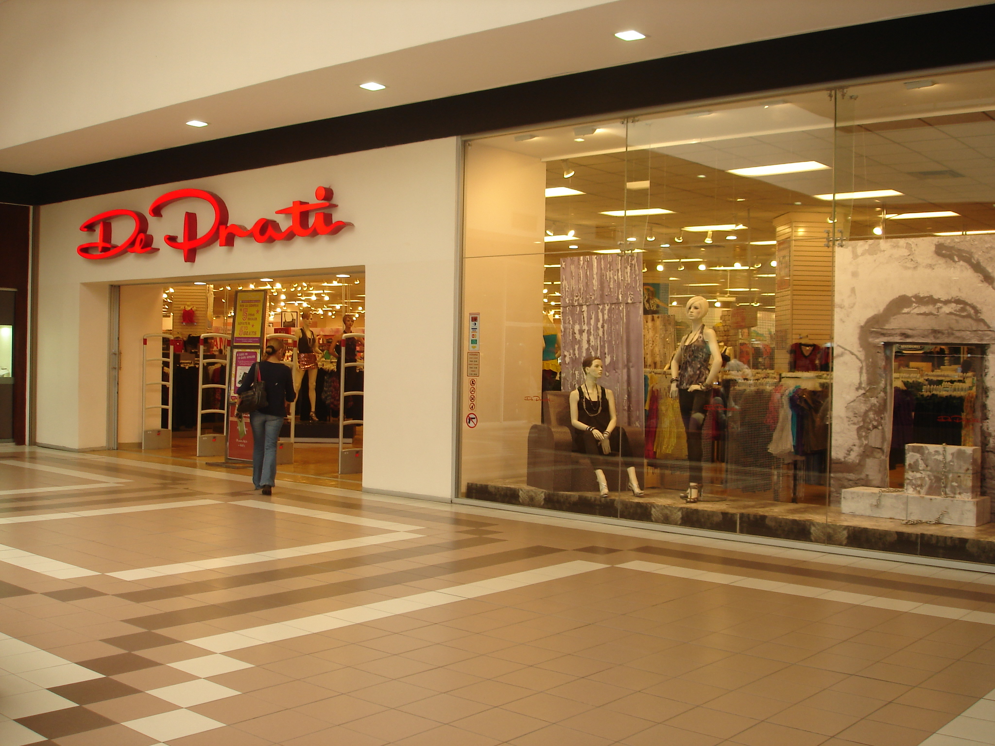 Una tienda de De Prati en un centro comercial